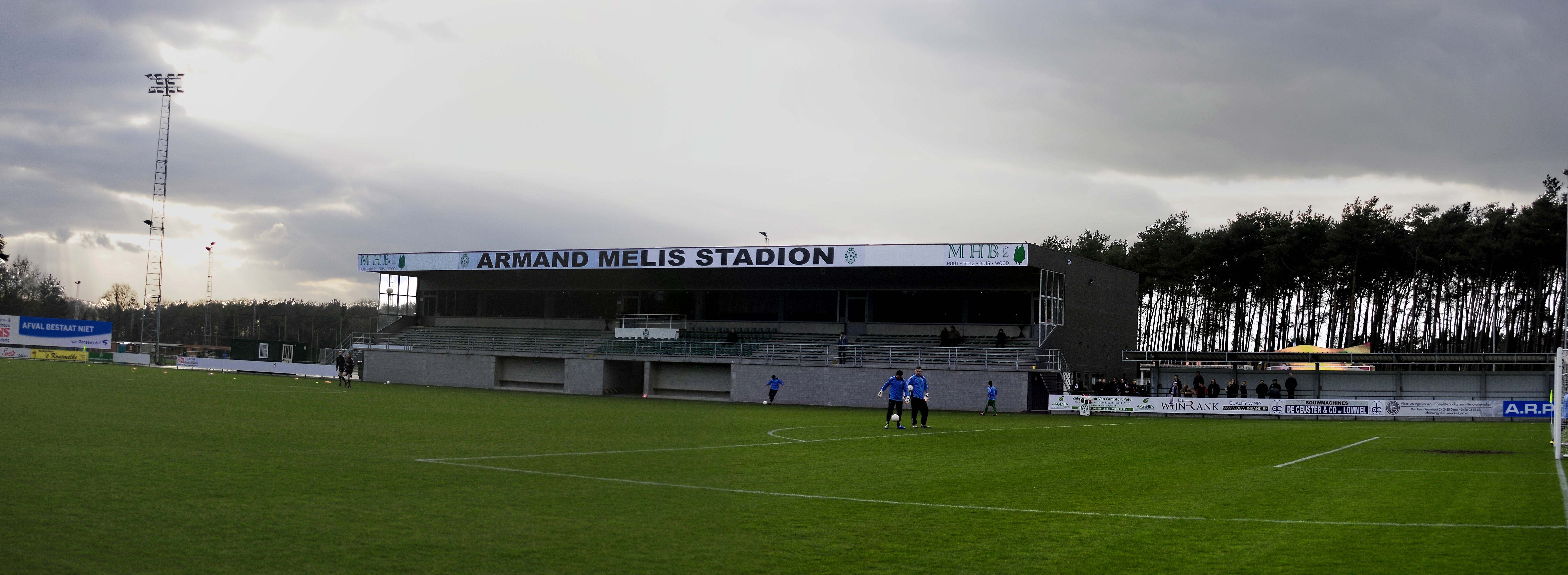 Het voetbalstadion van KFC Dessel Sport, Dessel, België